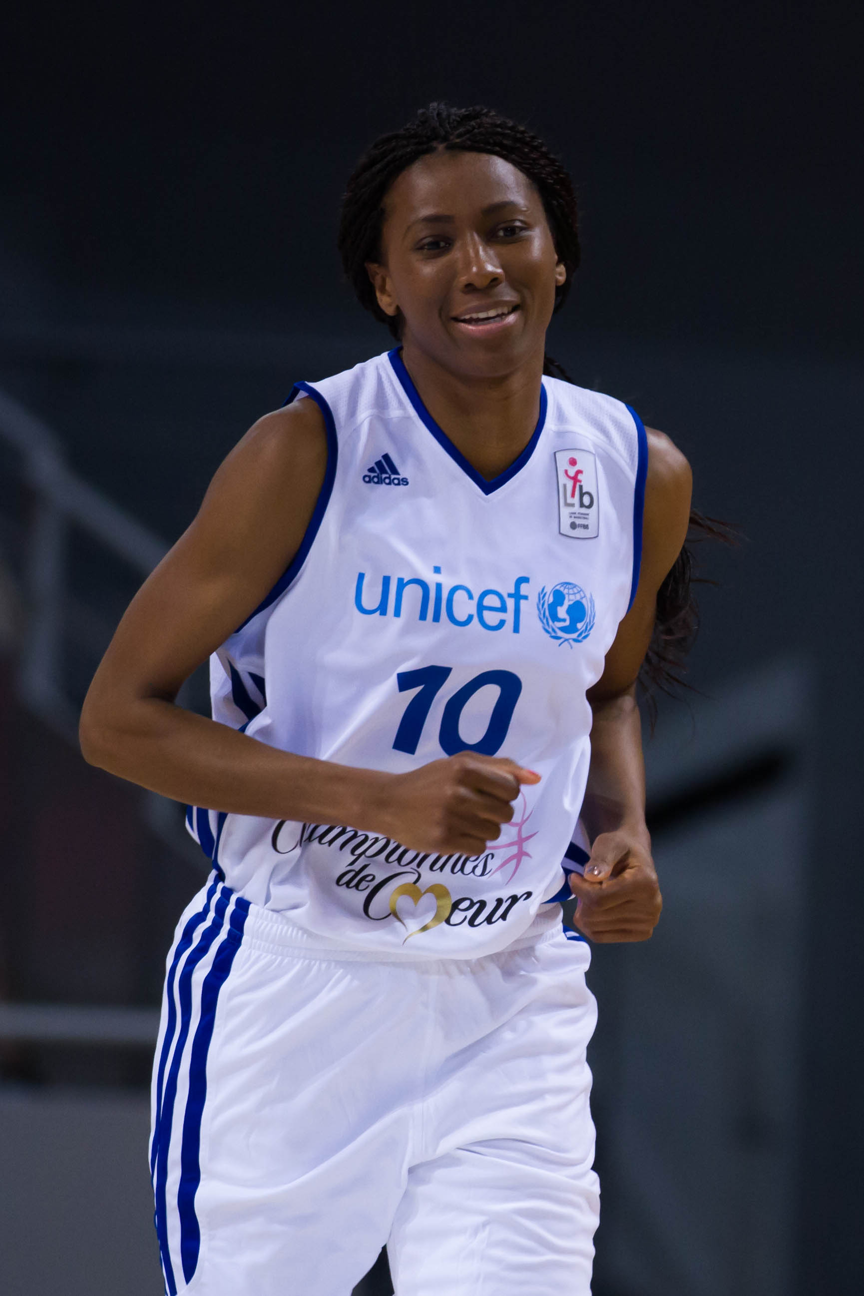 Géraldine Robert, match de gala championnes de cœur